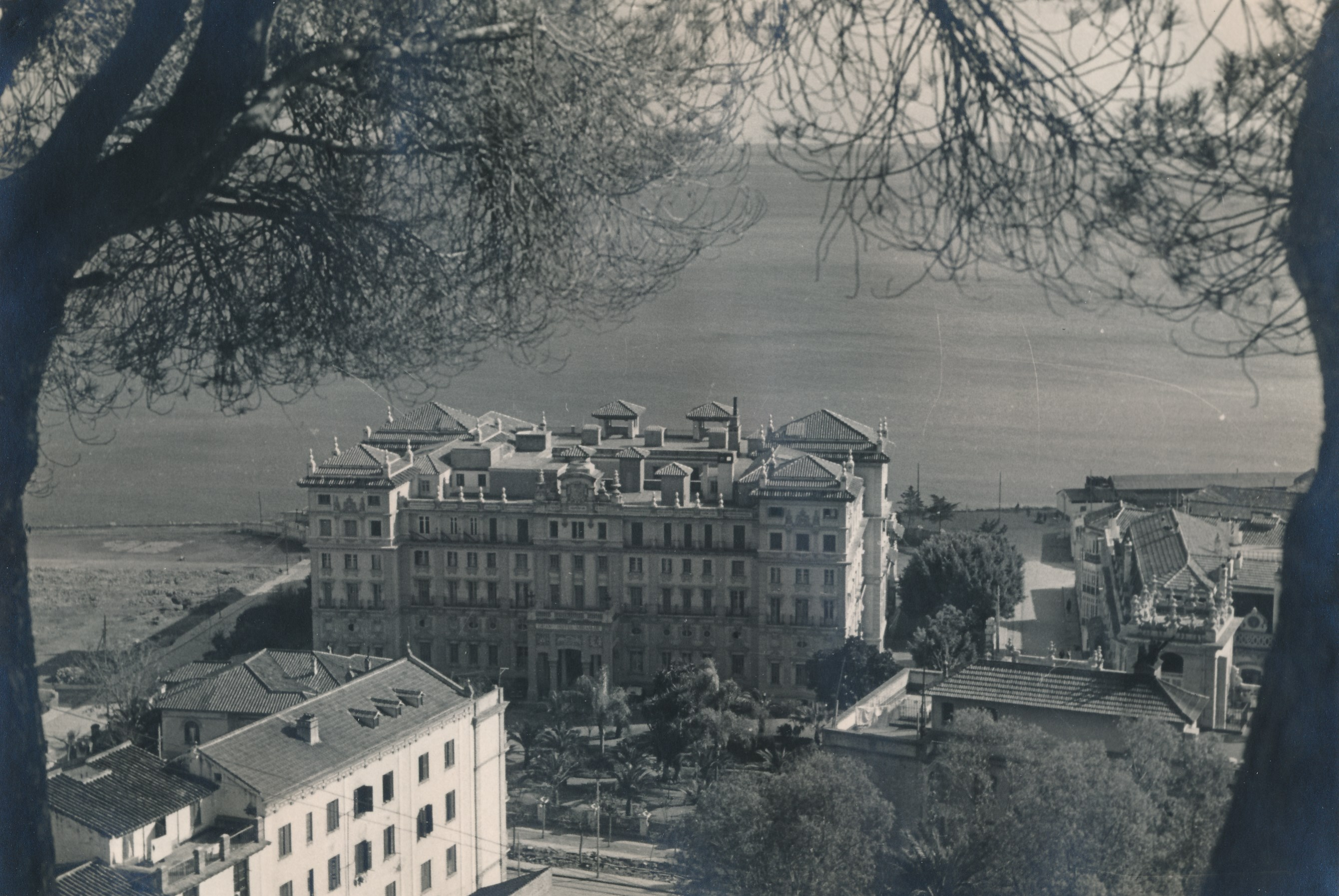 Málaga Procedencia: Archivo Fotográfico de la Dirección General de Turismo (1951-1992) Fotógrafo: Zubillaga Registro nº: 559 Signatura: Caja 6 Fondos: Biblioteca de la Facultad de Empresa y Gestión Pública (Universidad de Zaragoza) Legado: Luis Fernández Fuster / E.S. Turismo Huesca